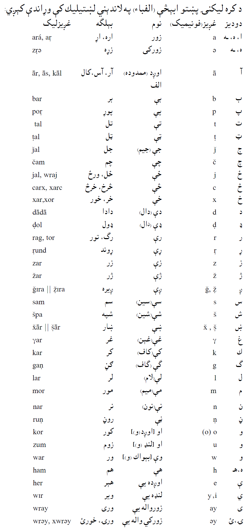 پښتو: پښتو لاتيني ابېڅې